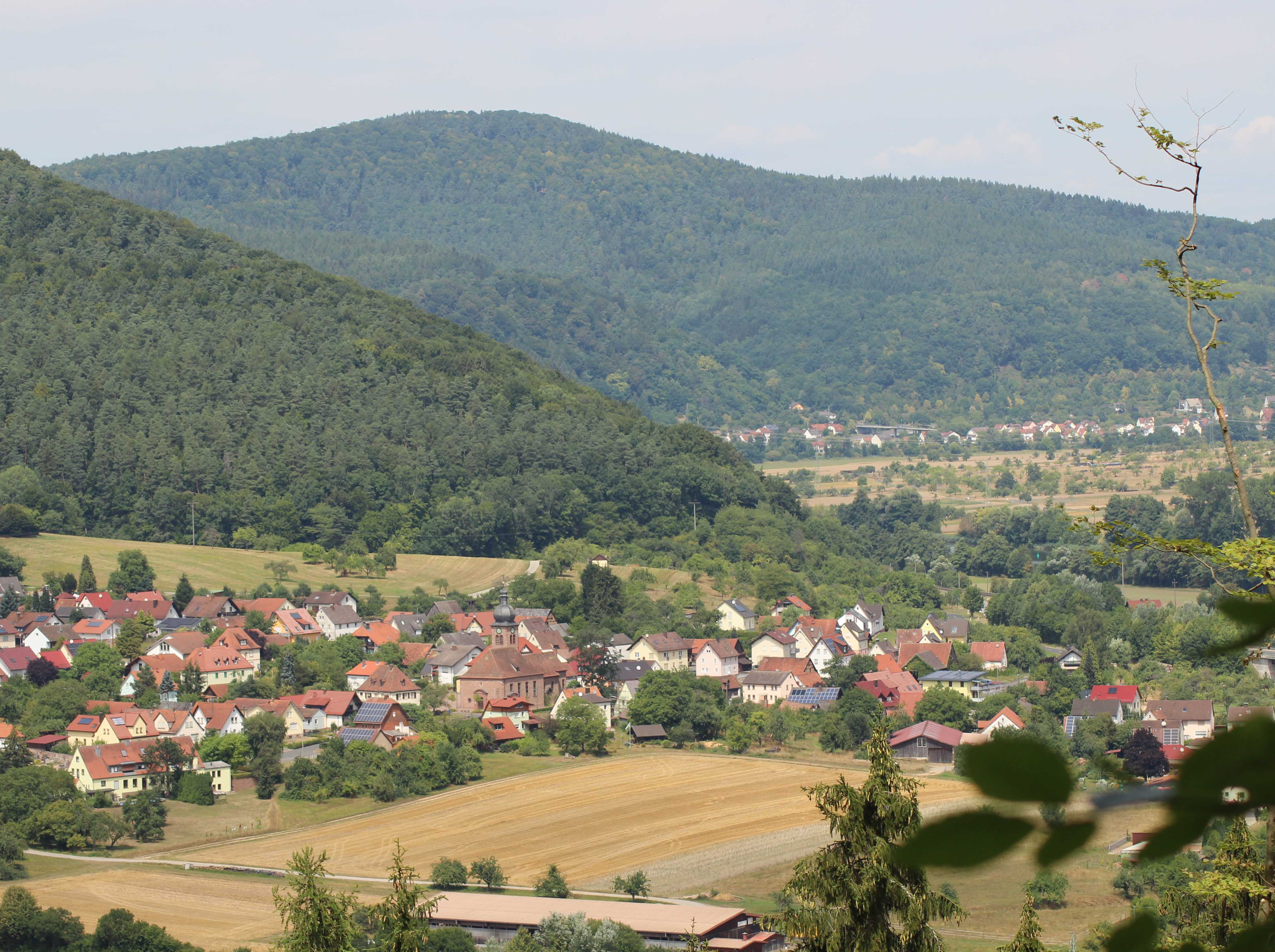 Ansicht von Neuendorf